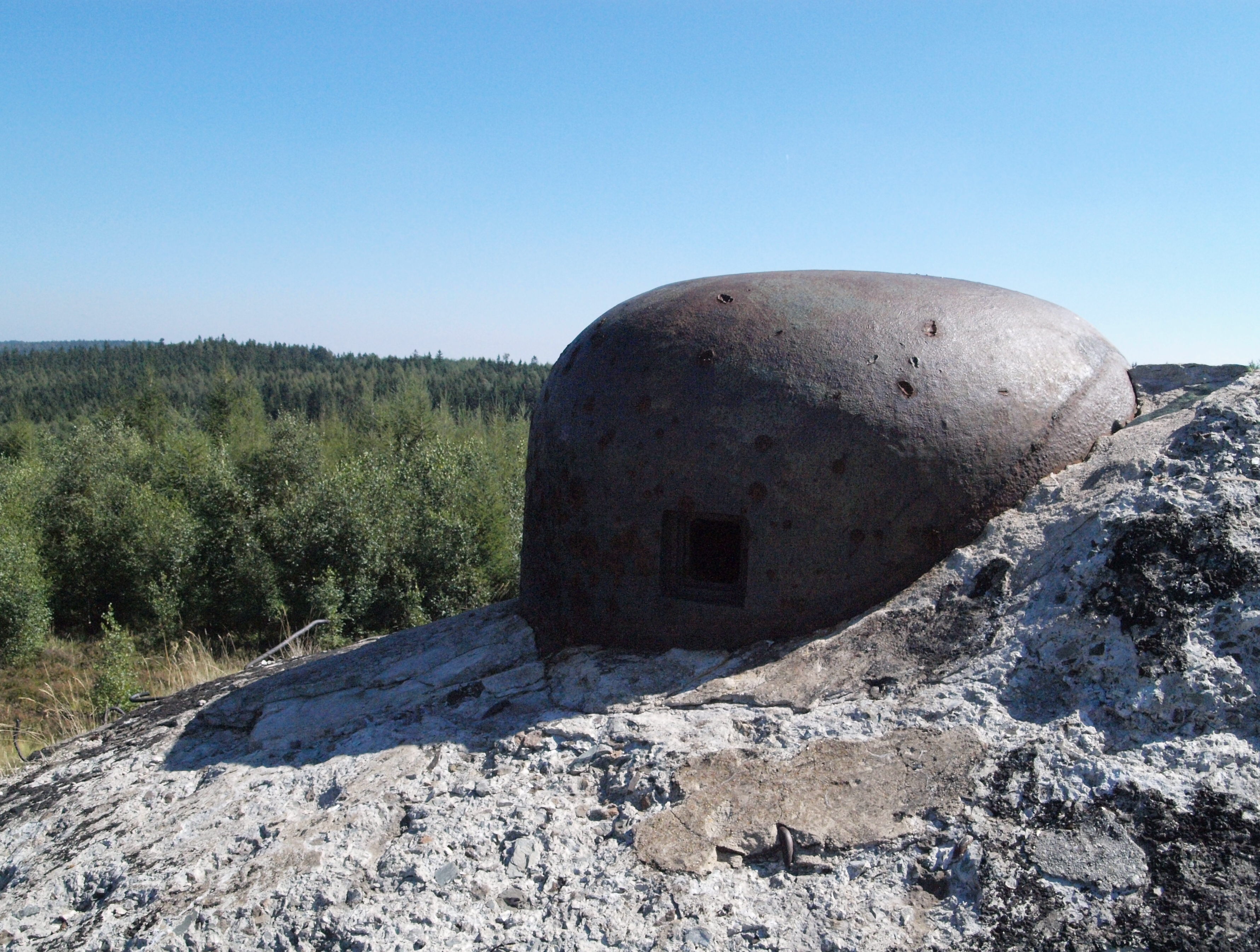 Česky: Zvon na objektu CE se stopami po ostřelování